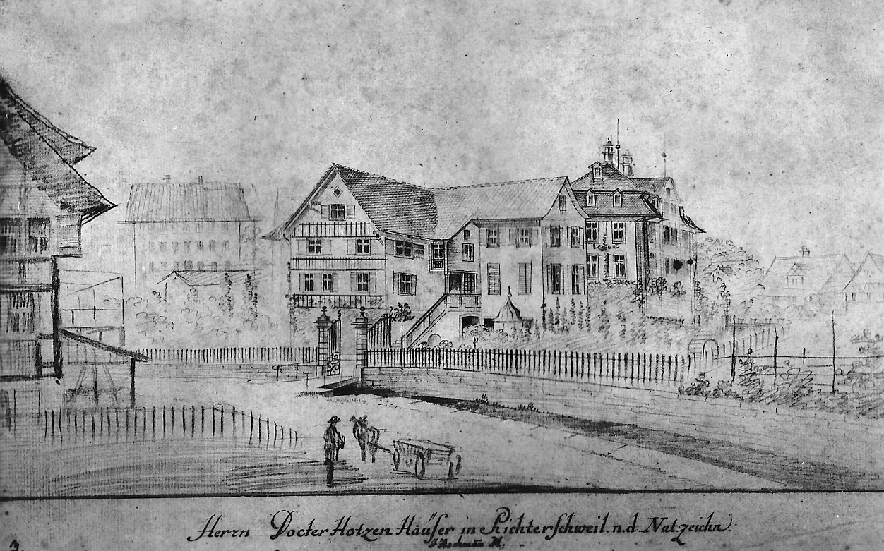 Johann Jakob Aschmann (1747–1809): Die Häuser von Dr. Johannes Hotze (1734–1801) am offenen Dorfbach in Richterswil. Vorne Unteres Hotzehaus von 1685 ("Diana", Poststr. 16), hinten Oberes Hotzehaus von 1764 ("Seeblick", Poststr. 20).